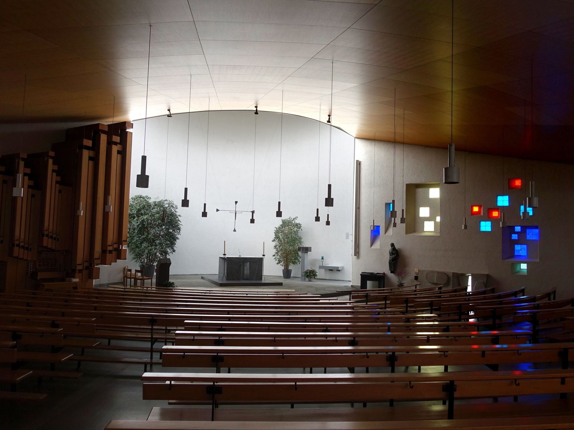 Hermann Baur (1894-1980) Architekt. Röm.-kath. Bruder Klaus Kirche (1955-1959) in Birsfelden, Schweiz